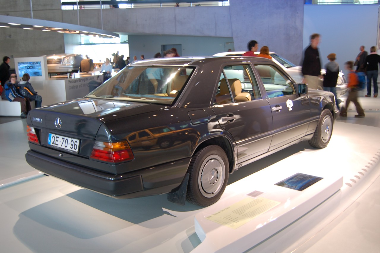 A million-mile taxi from Portugal